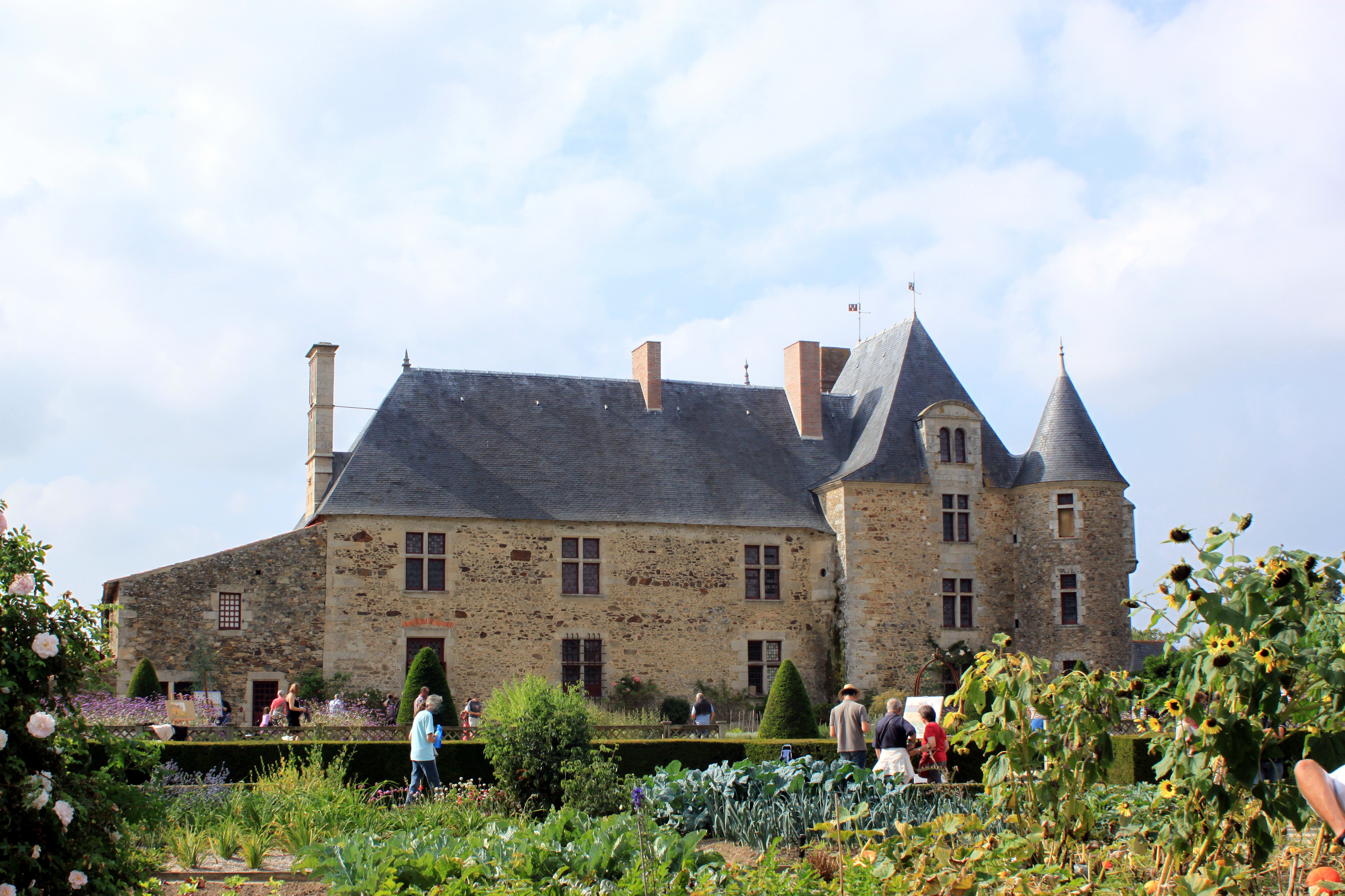 Le logis de la Chabotterie vu du jardin, Fr-85-Saint-Sulpice-le-Verdon. .